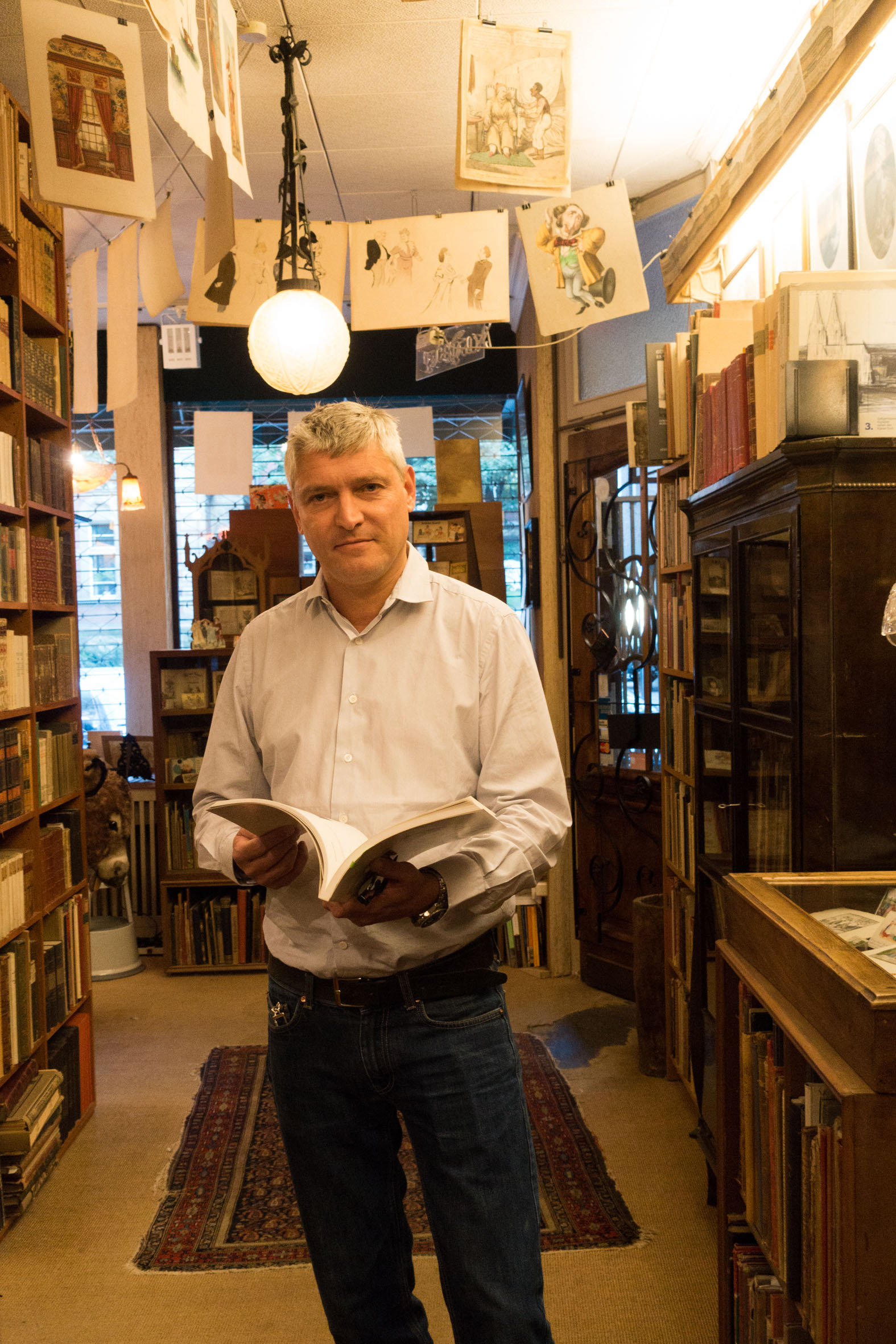 Daniel Buchholz im Antiquariat Buchholz